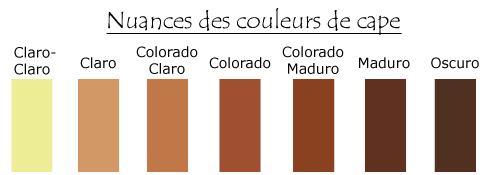 Auteur : ZTC Site : aucun site.